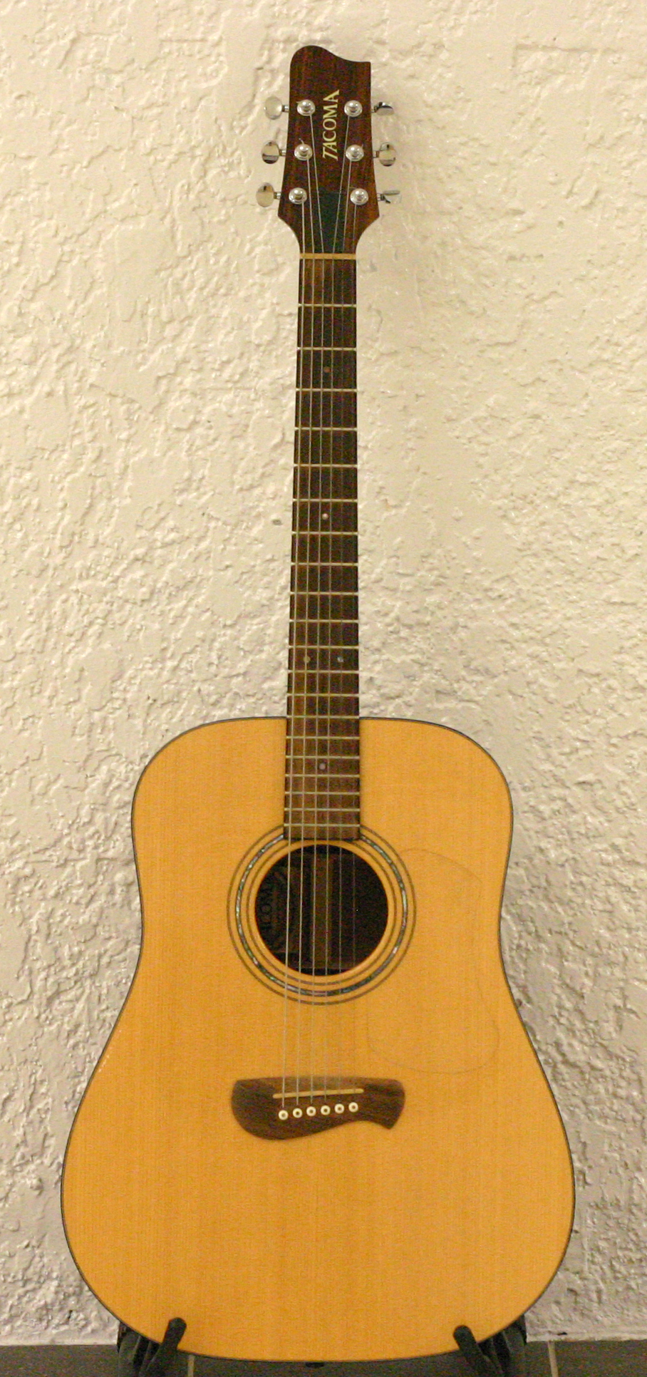 Tacoma guitar